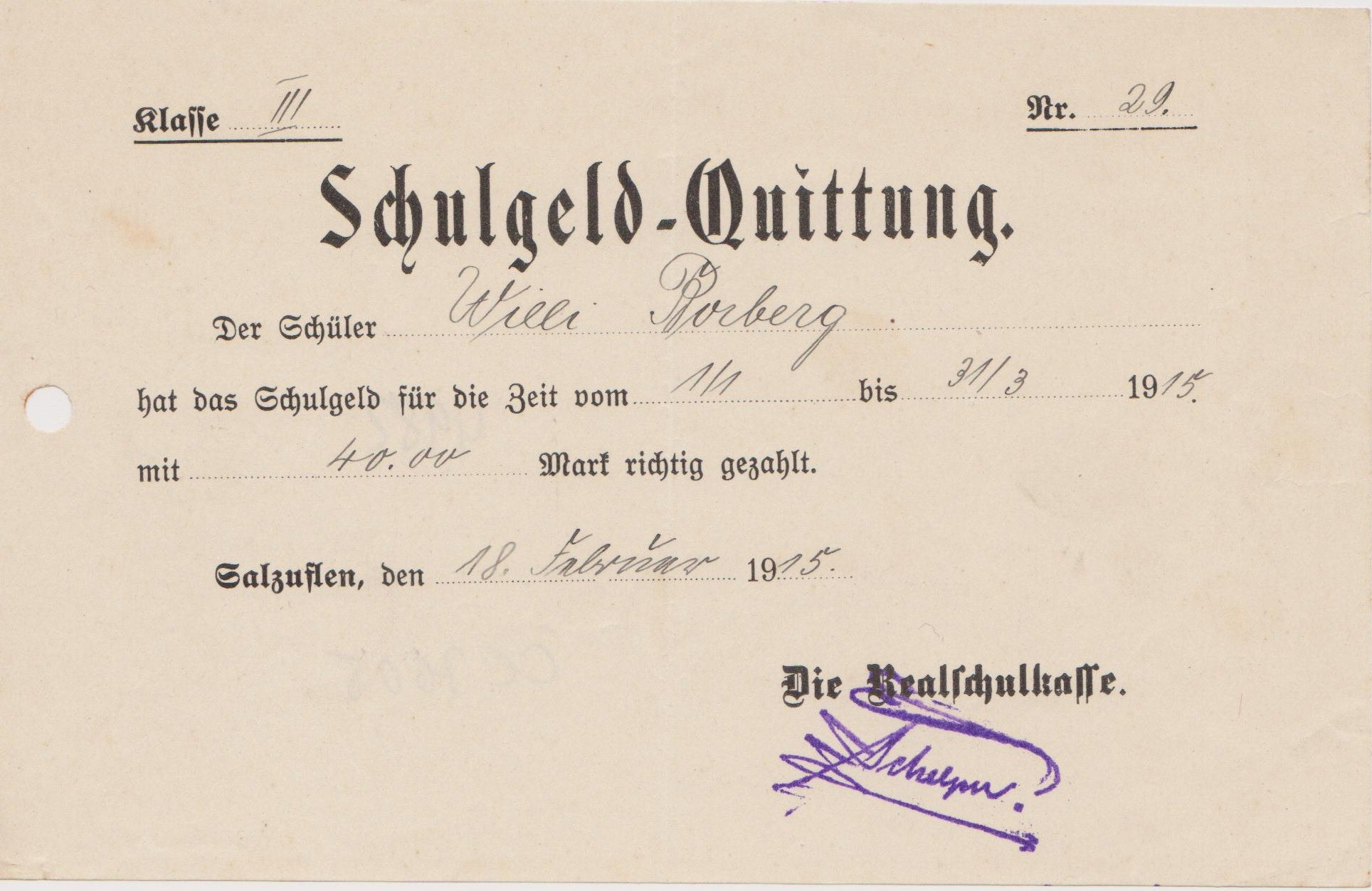 Deutschland - Nordrhein-Westfalen - Kreis Lippe - Bad Salzuflen: Schulgeld-Quittung für Realschule in Salzuflen, 1915